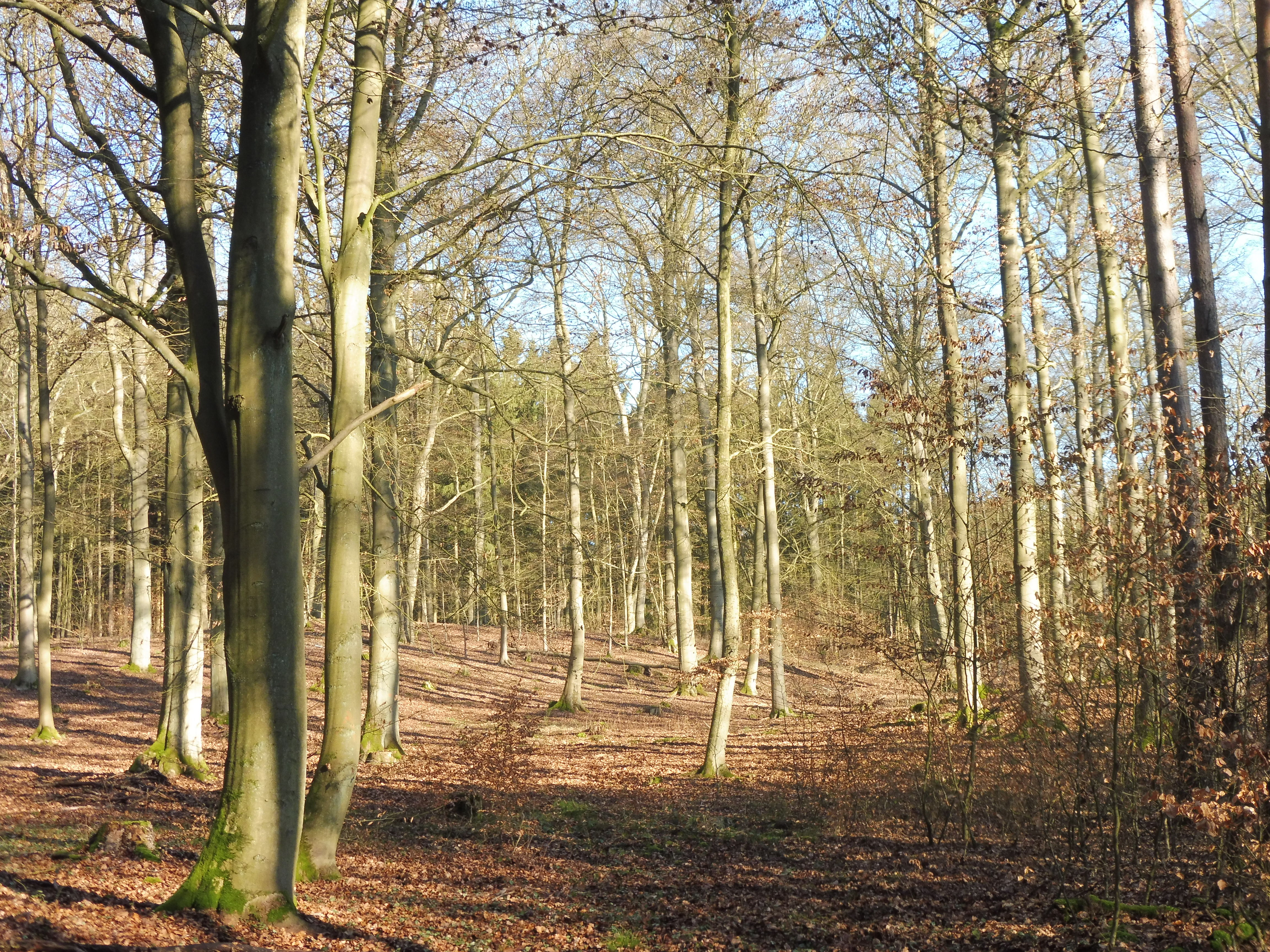 Buchenwald in Twietfort bei Ganzlin, Südmecklenburg.